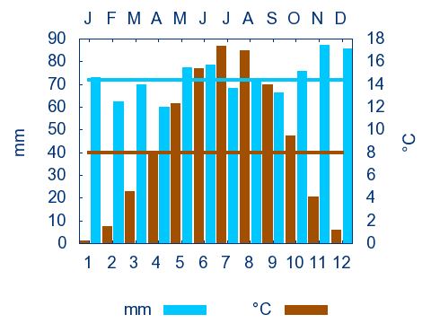 Klimadiagramm